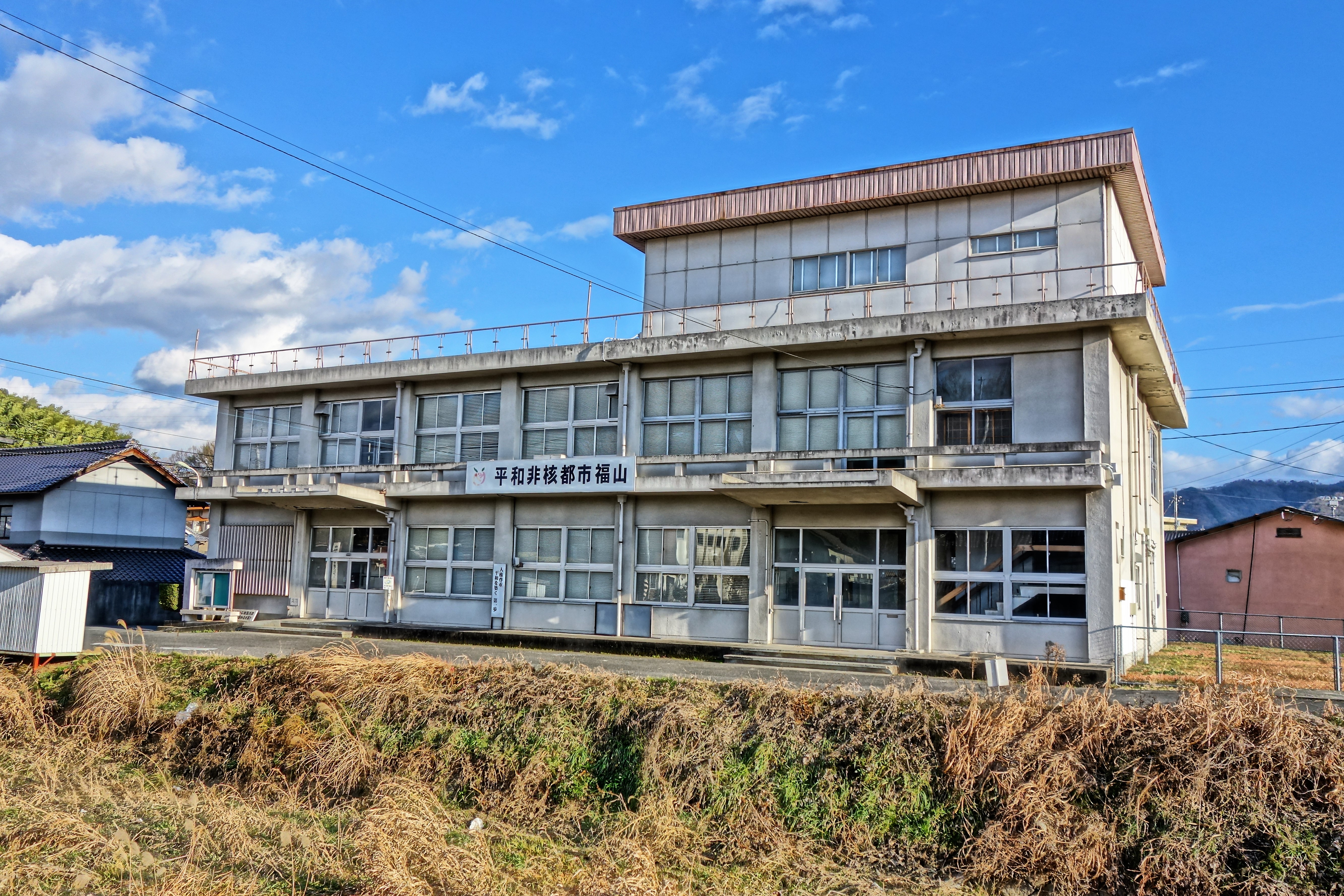 広島県福山市芦田町に残る、旧芦田町役場。芦品郡芦田町時代に使用された。福山市へ合併された後は、福山市芦田支所として使用された。昭和35年3月定礎。当時は右側に議事堂があった。